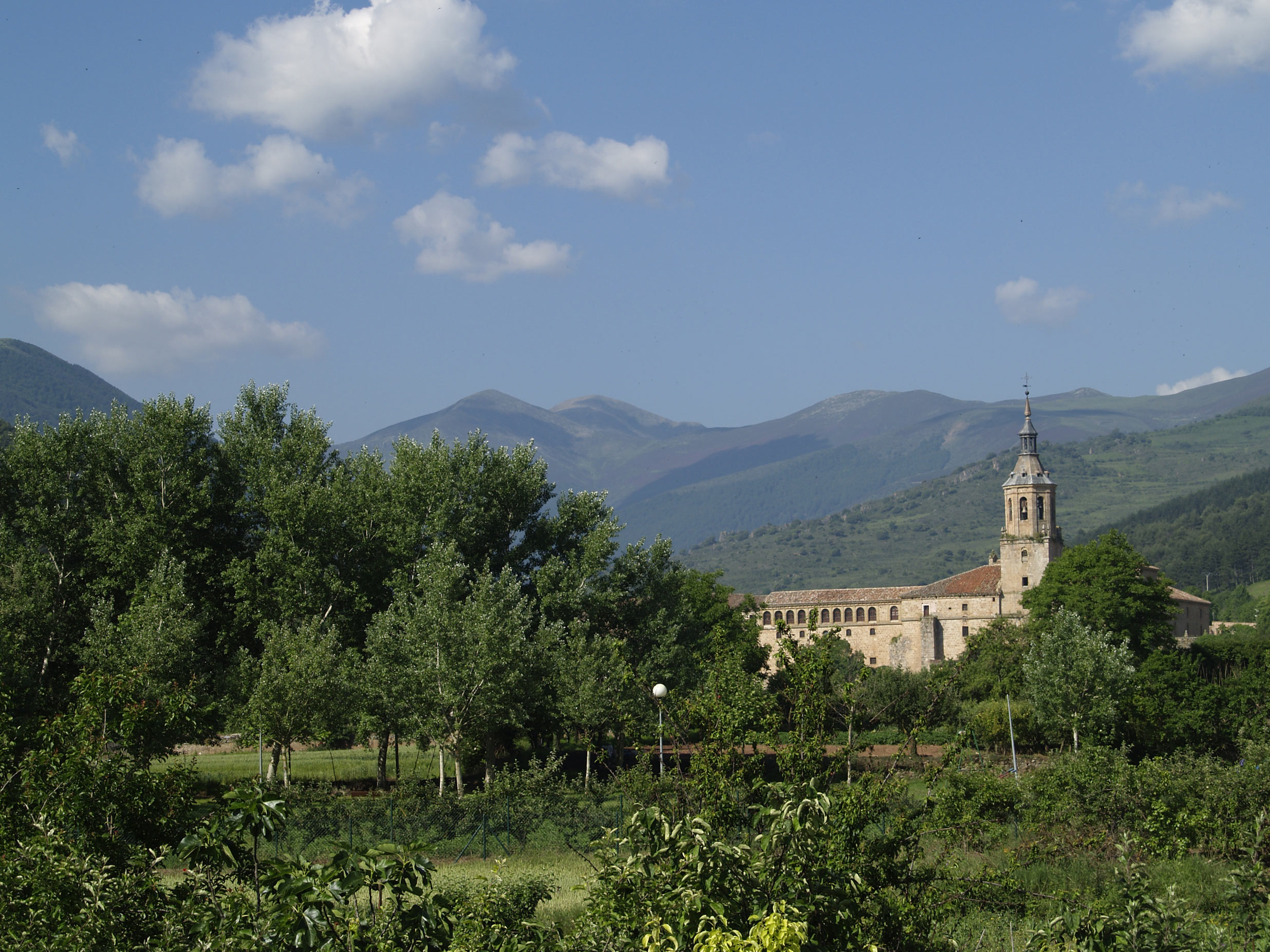 Valle de san millan de la cogolla. Monasterio de Yuso al fondo. La Rioja. España